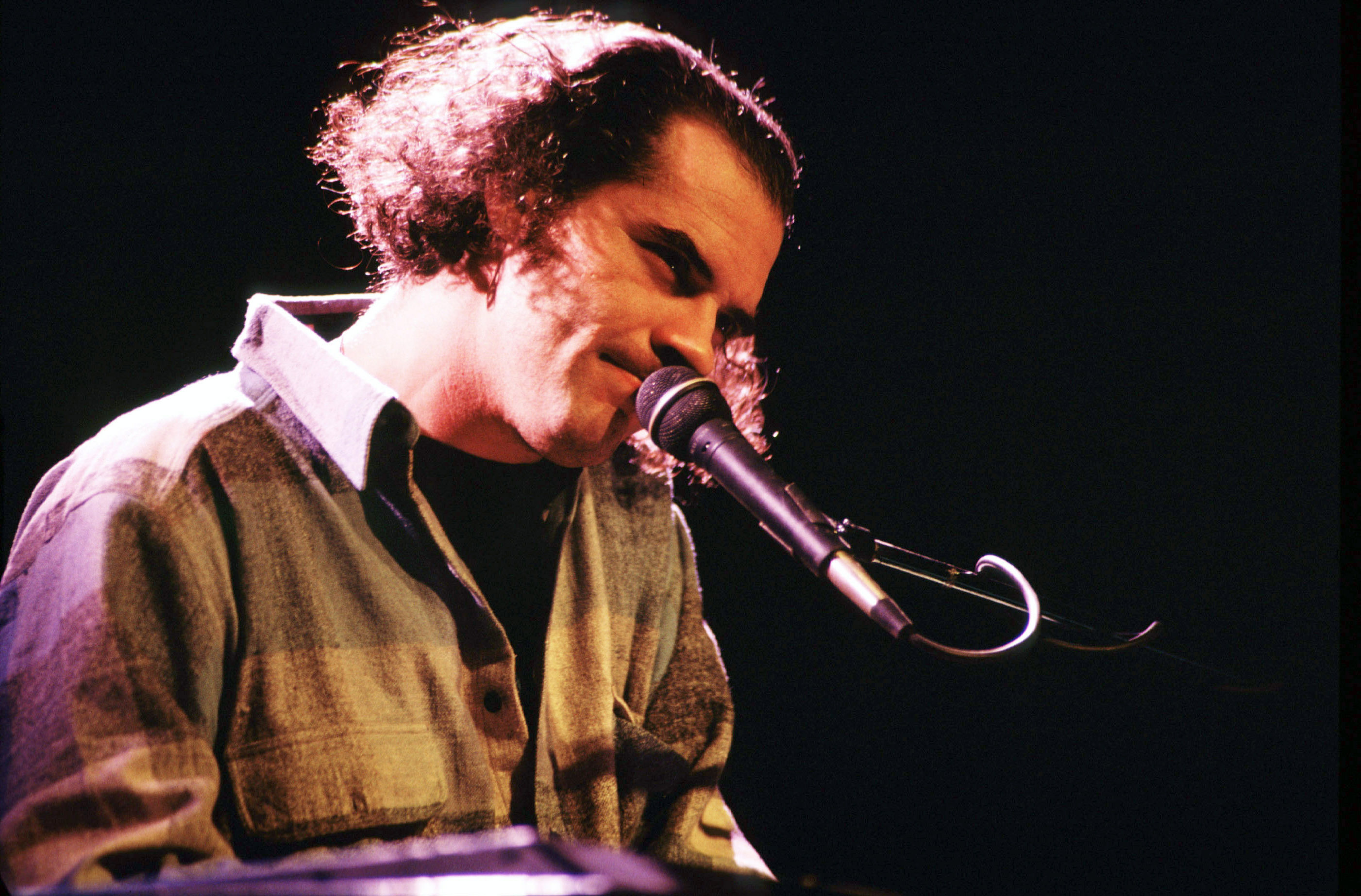 francesco baccini